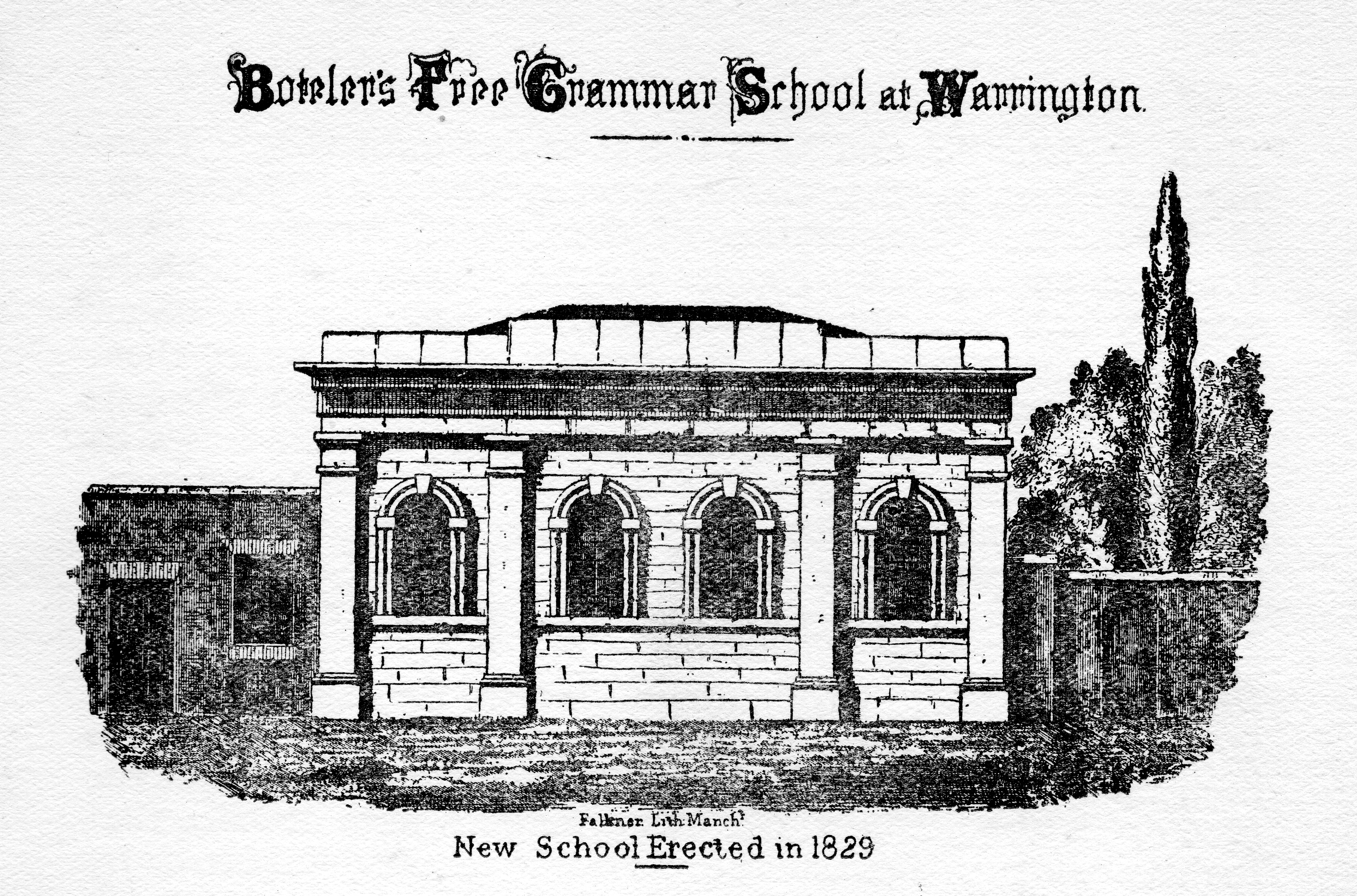 Grammar School in 1829